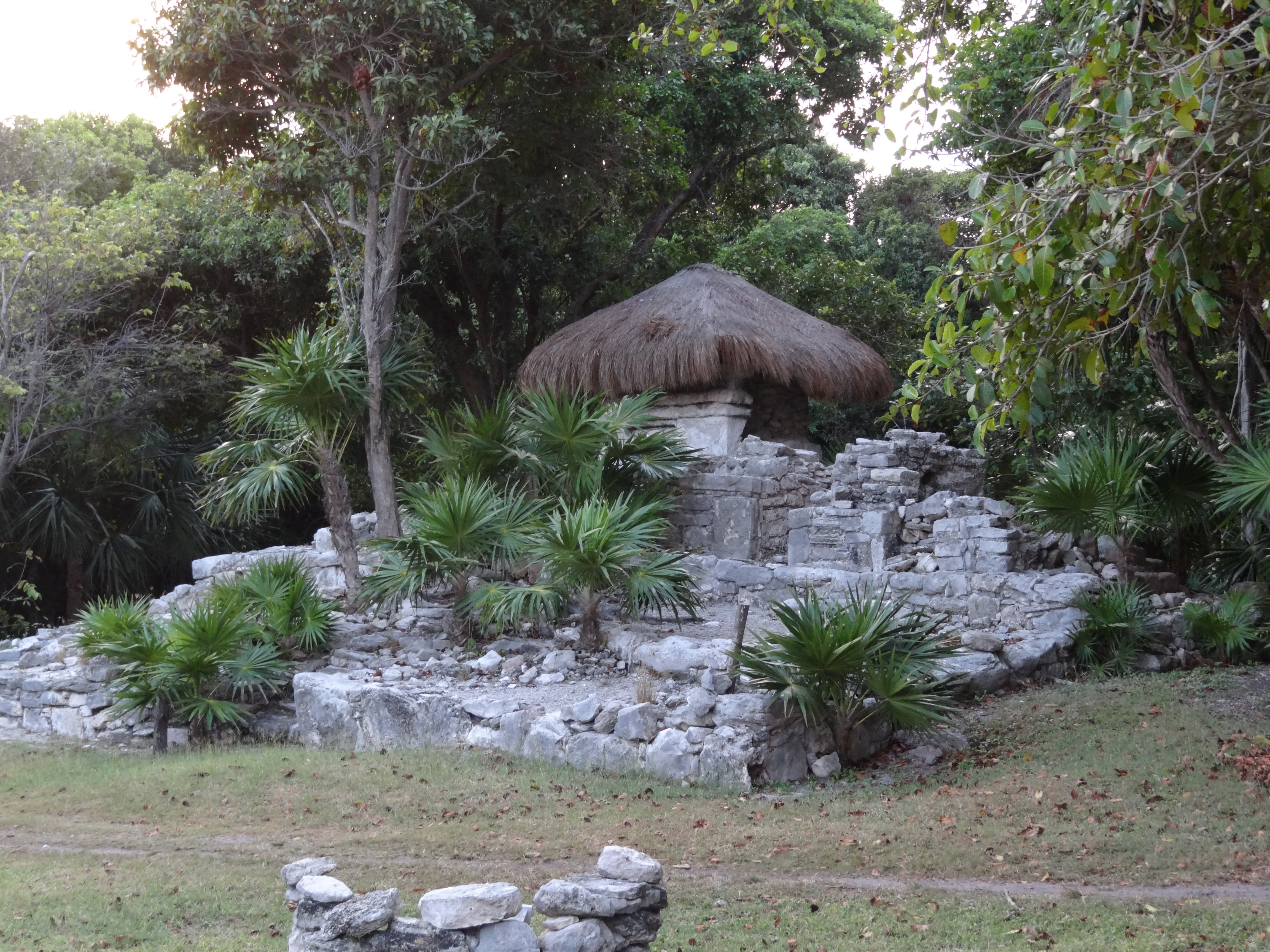 Xaman-Ha, or "waters of the north," is archaeology site in Playa del Carmen.It was a rest stop of sorts for Mayan travelers making their way from the great cities of the Mayan world to the island of Cozumel. שאמאן-הַא הם שמם של של שרידים ארכאולוגים הנמצאים על חוף הים הקריבי בחצי האי יוקטן. משמעות השם בשפת המאיה הוא מים של הצפון. במקום שוכנת היום העיר פְּלַאיה דֶל כַּרְמֶן.